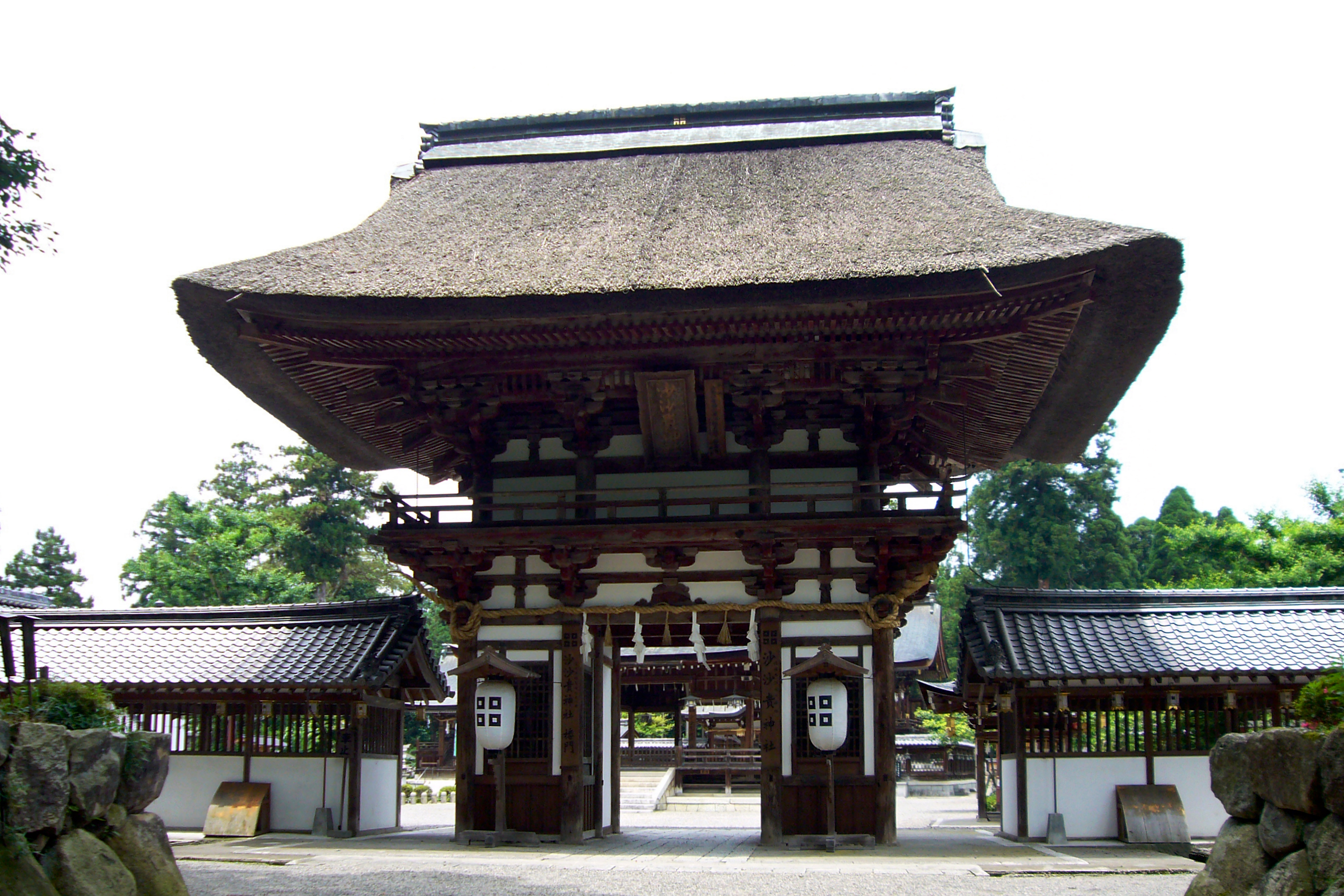 Sasaki-jinja in Azuchi, Shiga, Japan